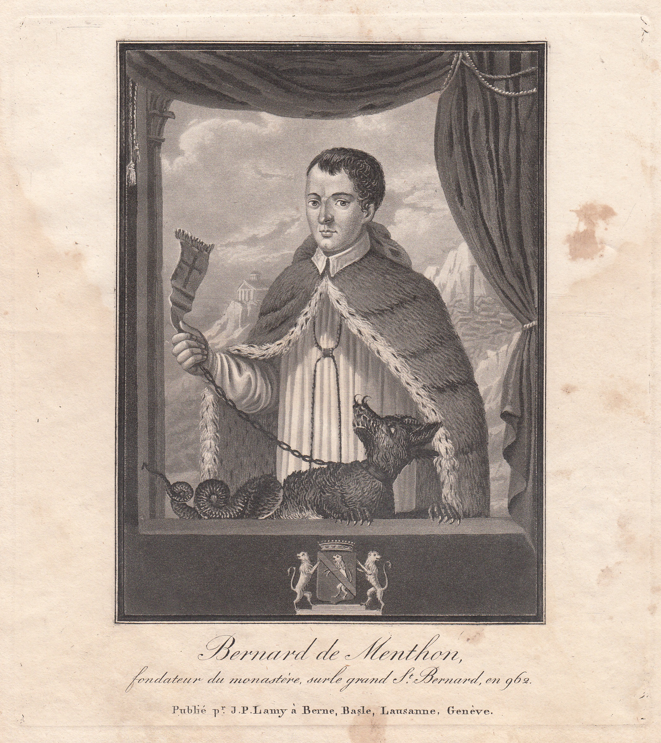 Gravure de St Bernard de Menthon publiée vers 1830 par Johann Peter Lamy, Suisse